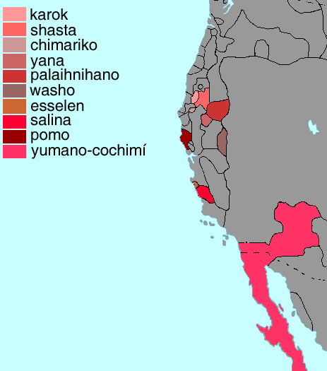 Hokan Languages